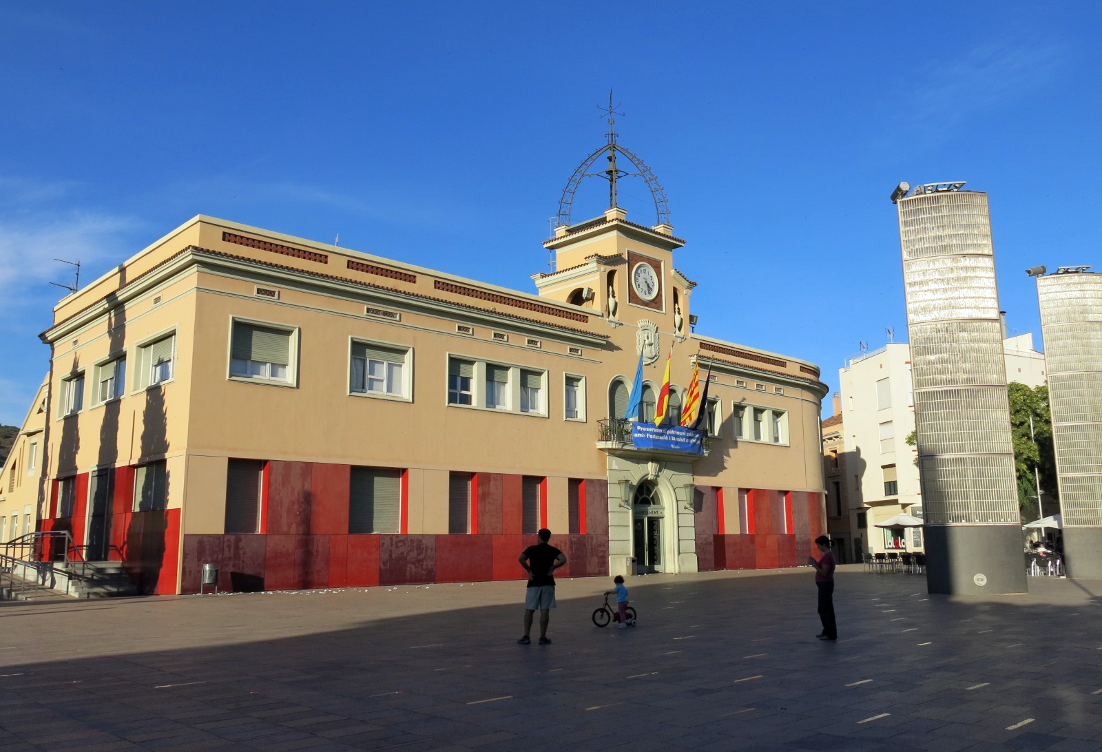 Casa de la Vila (Santa Coloma de Gramenet).